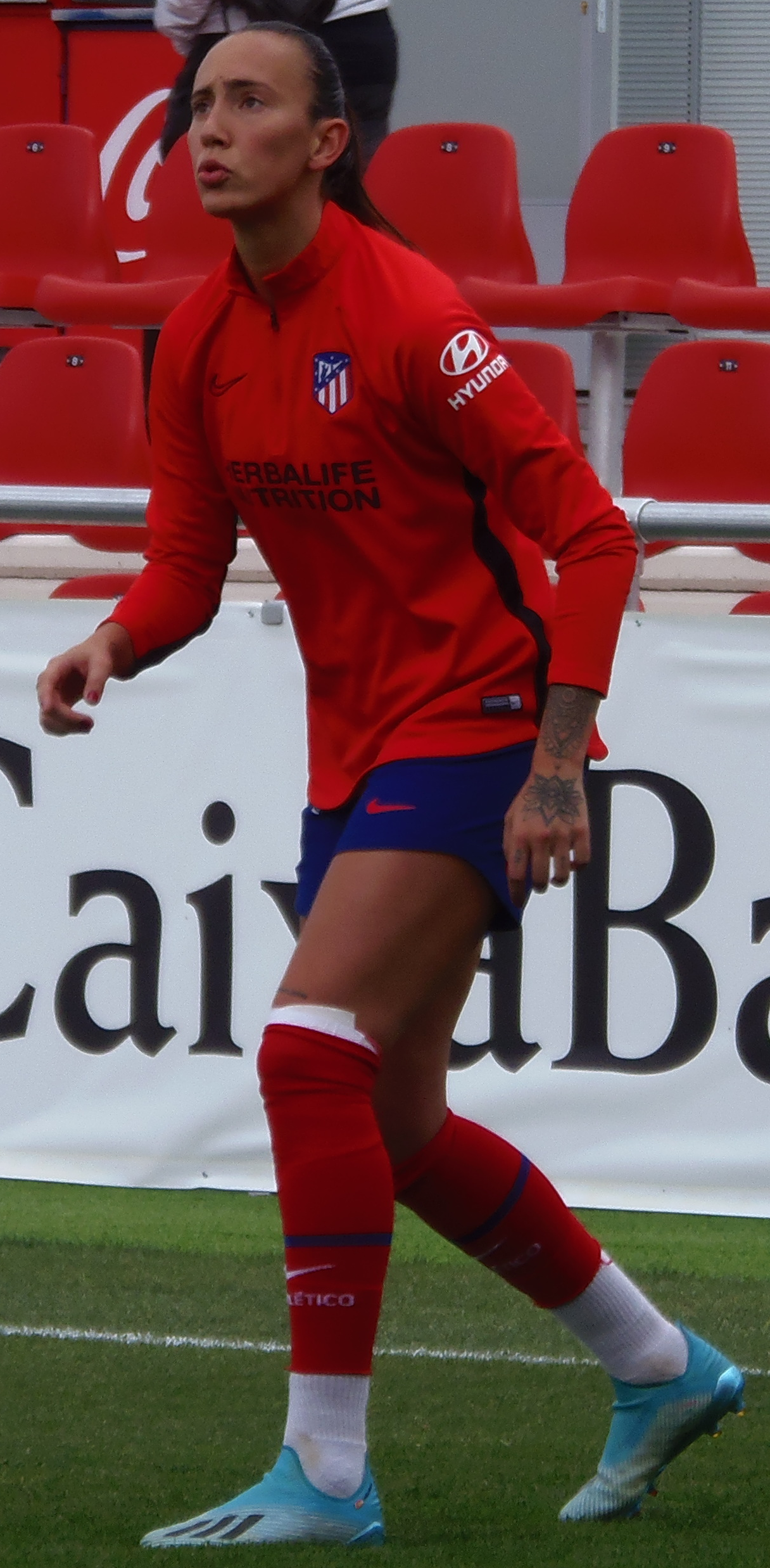 Virginia Torrecilla el 20 de octubre de 2019, en el calentamiento previo a un partido de Liga contra el Madrid CFF